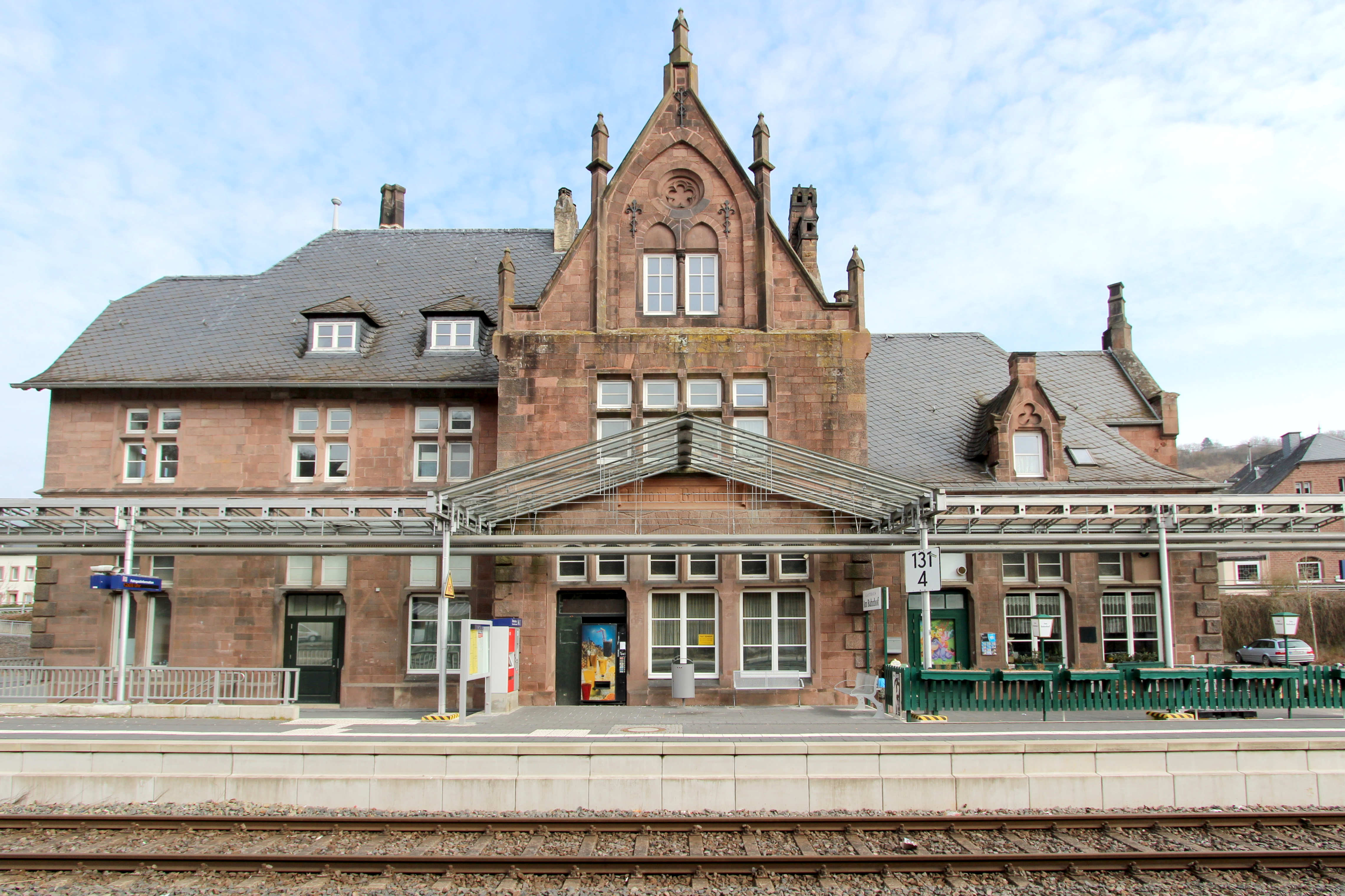 54634 Erdorf, Mainzer Straße 12. Bahnhof Erdorf der Eifelbahn; Empfangsgebäude, malerischer Rotsandsteinbau, teilweise Fachwerk, 1871. Aufnahme von 2018.